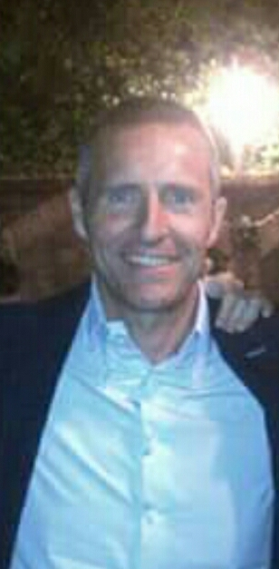 L'ex arbitro di calcio Emidio Morganti nel 2013